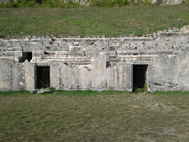 Ingressi della gradinata ovest